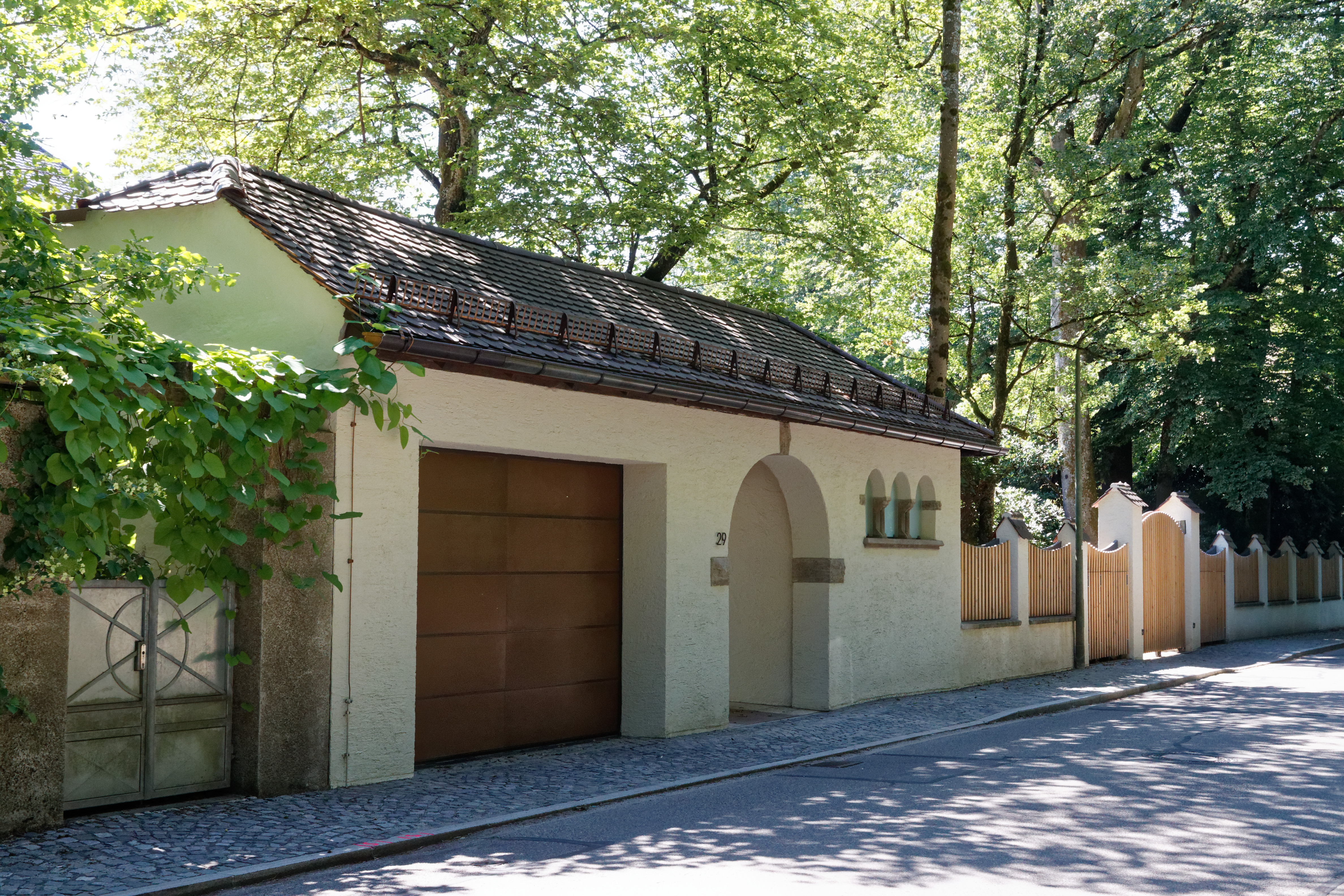 Villa Littmann in der Heilmannstraße 29 in München, Torhaus und Gartenmauer